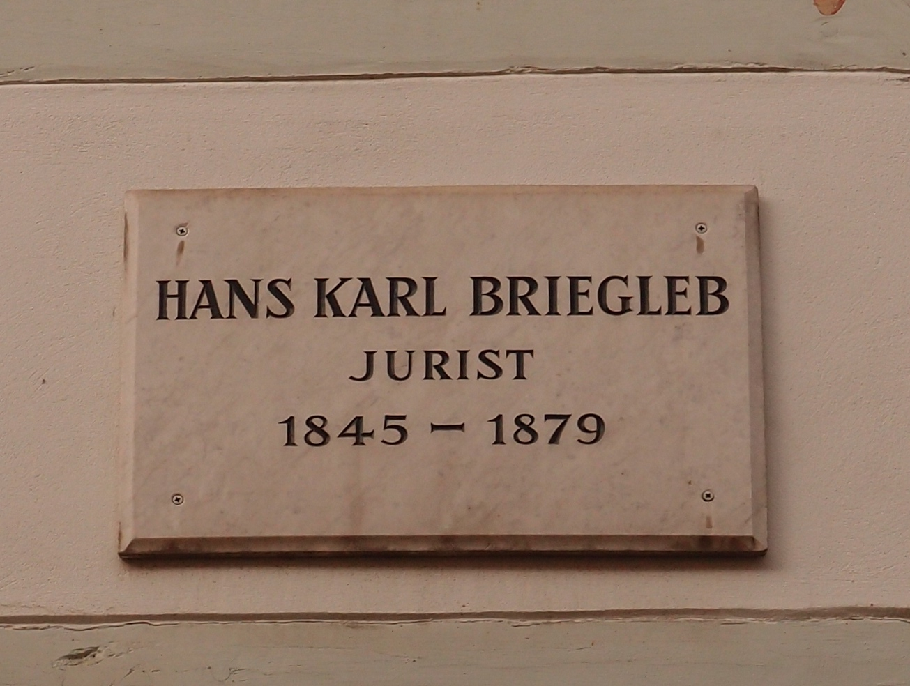 Gedenktafel für den Juristen und Politiker Hans Karl Briegleb (1805-1879) in Göttingen, Gotmarstraße 1